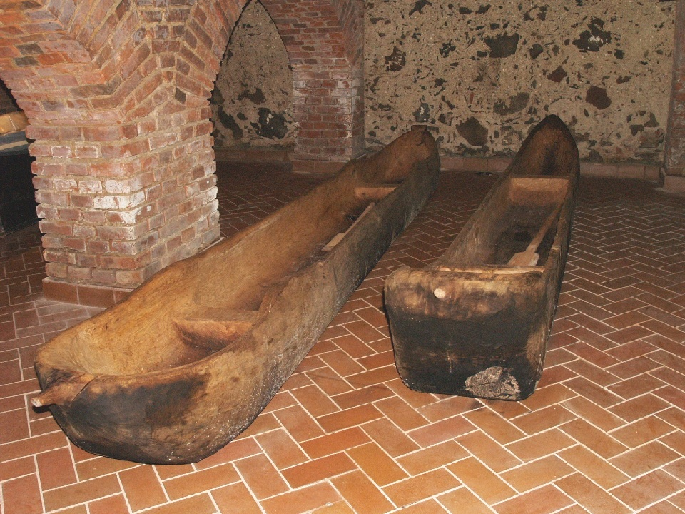 Senoviniai luotai